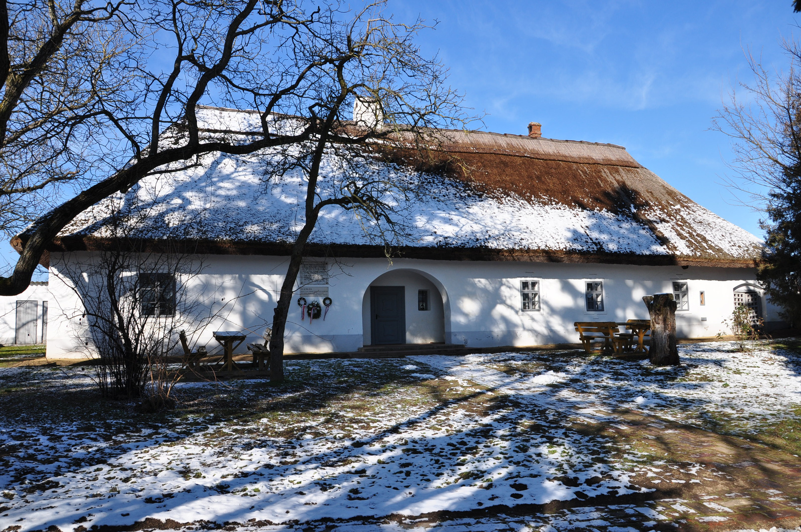 Kölcsey Ferenc szülőháza (Álmosd, Kölcsey Ferenc utca 11.)